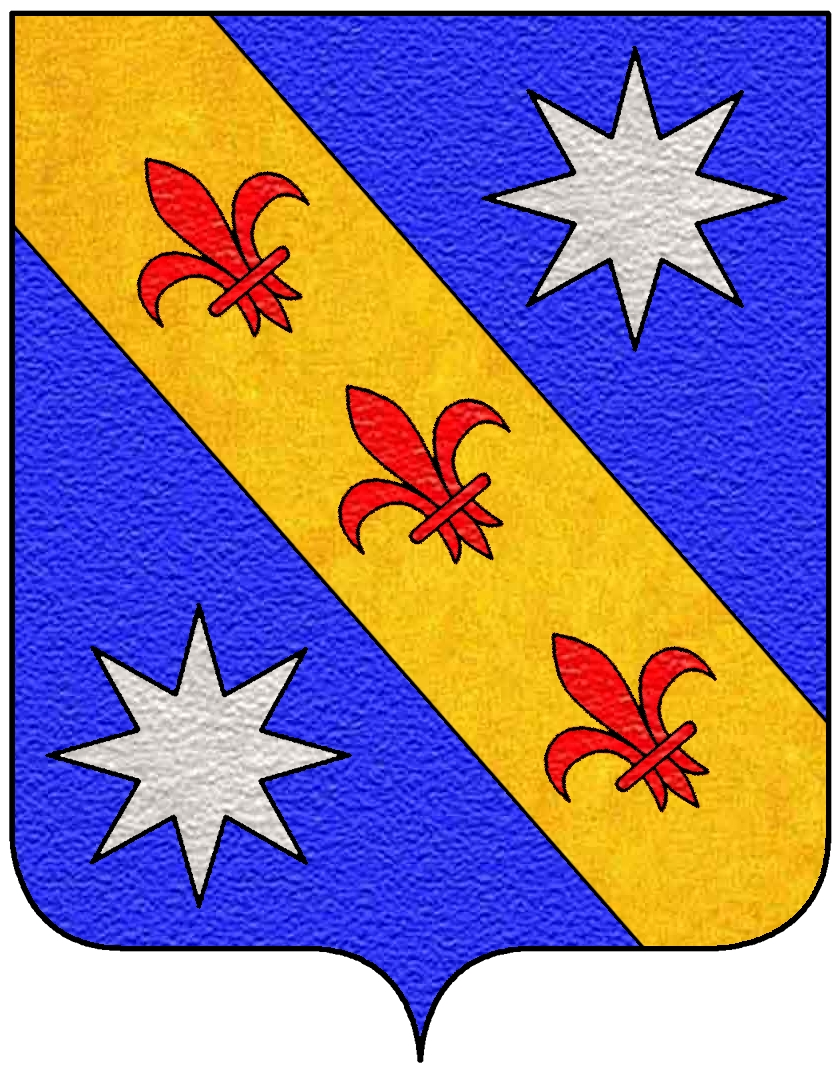 Stemma della famiglia Ghetaldi (Getaldić)